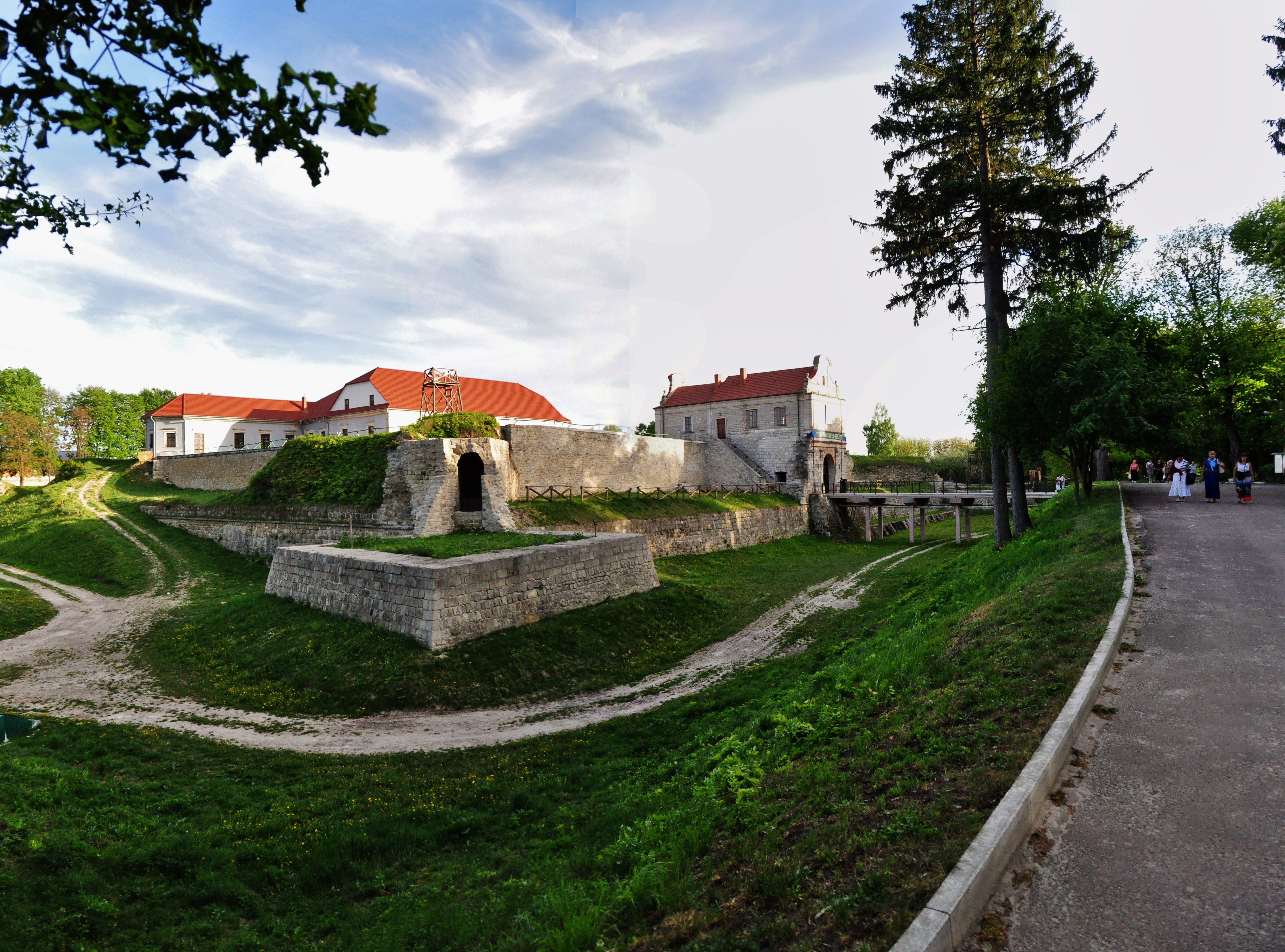 Призамковий парк у Збаражі. Пам'ятка садово-паркового мистецтва кінця XVIII ст.